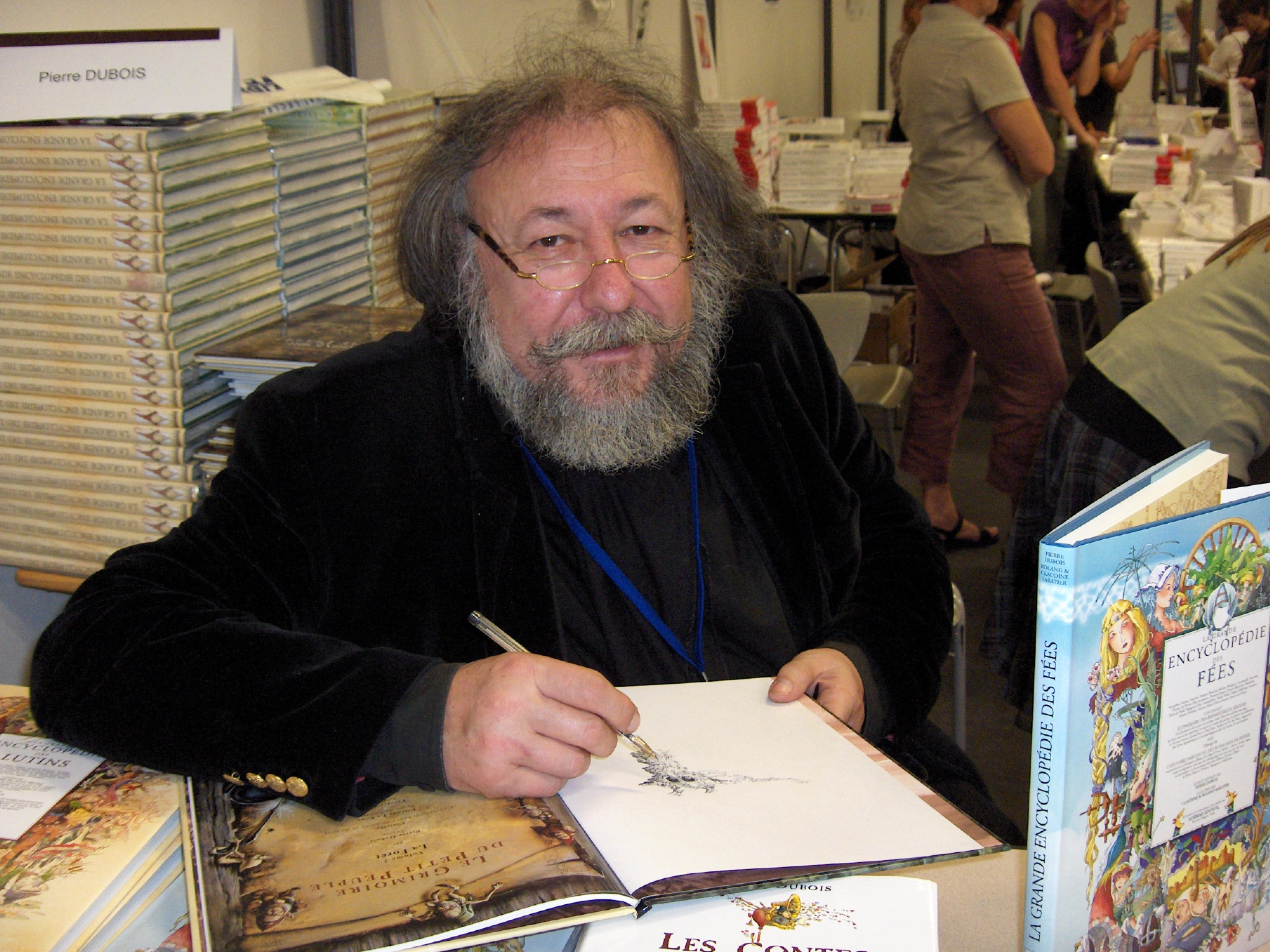 Pierre Dubois, écrivain et illustrateur français, au 18ème Festival international de géographie de Saint-Dié des Vosges